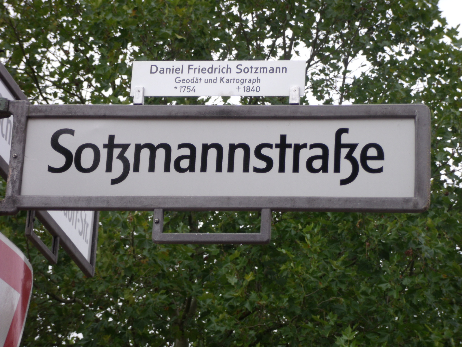 Straßenschild Sotzmannstraße in Berlin-Spandau